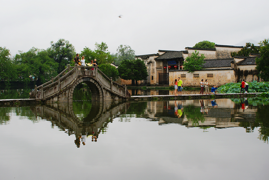 中文（中国大陆）: 安徽宏村風光